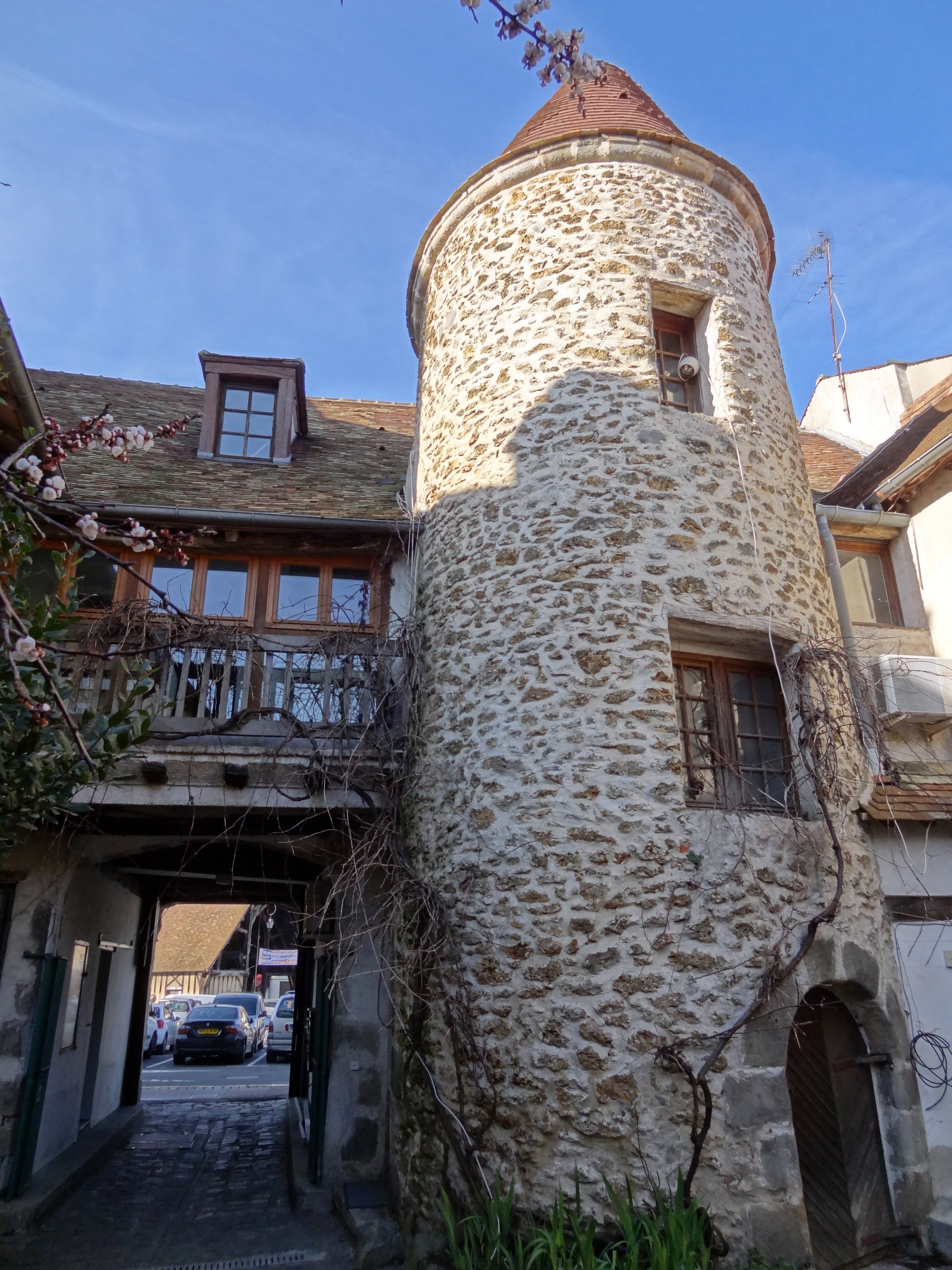 Maison du XVe siècle, 12 place du marché, Arpajon. Arrière-cours, tourelle en grès à toiture conique et passage vers la place du marché.